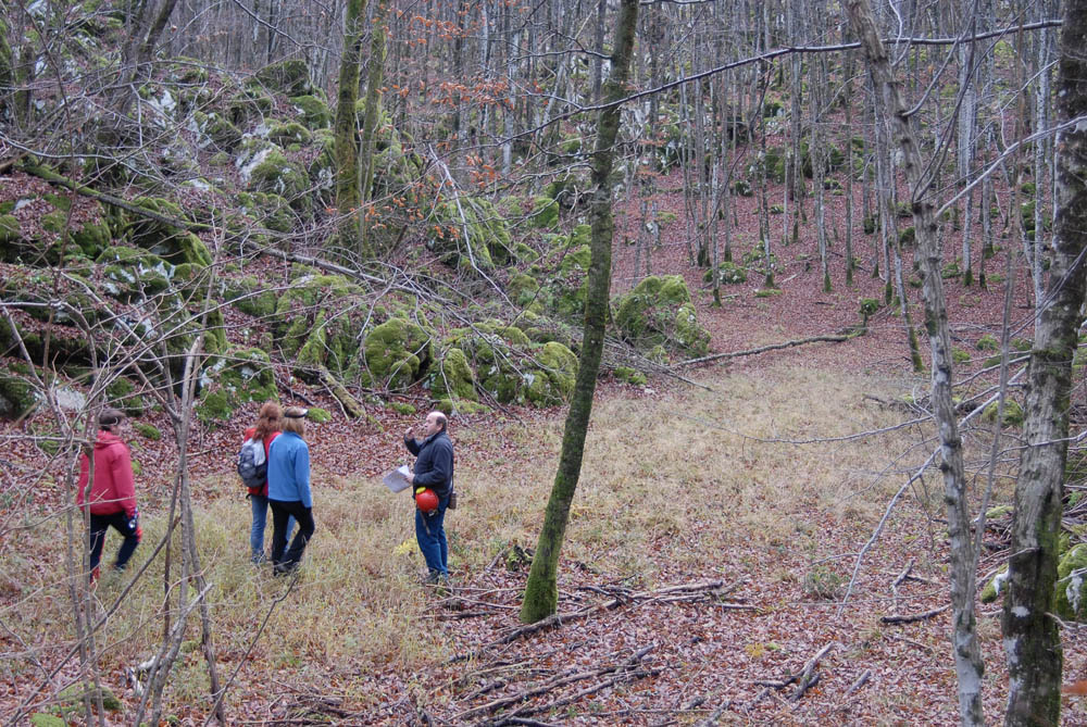 foto: Boštjan Burger, november 2006,(brezstropa jama Ulica)